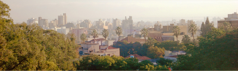 panorama parcial de Porto Alegre tomado dos altos do bairro Petrópolis, Porto Alegre, Brasil.